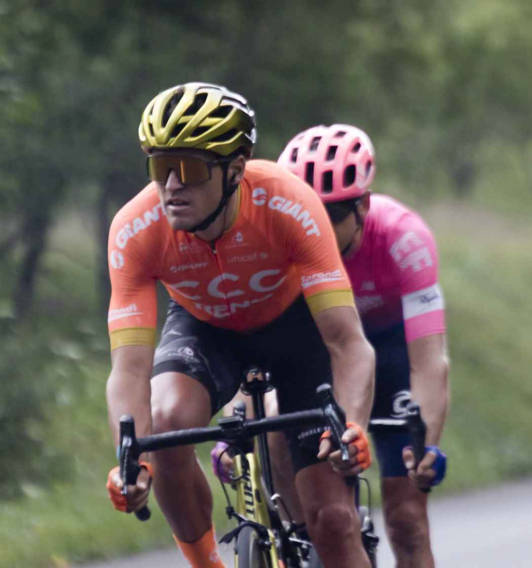 ALP10127 va